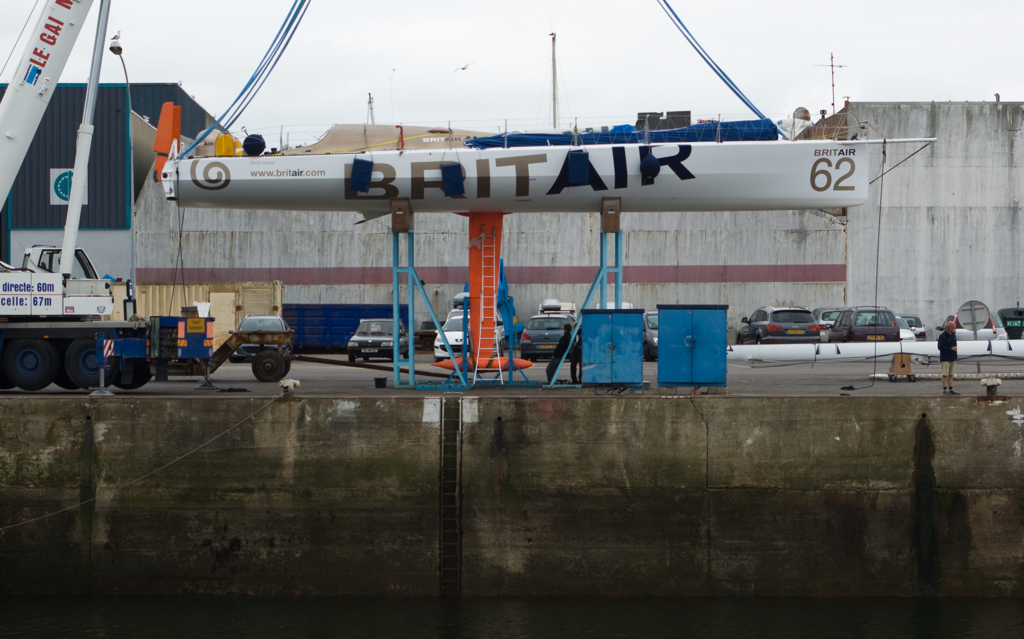 Le monocoque IMOCA 60 pieds BritAir sur le quai dans le port de Concarneau